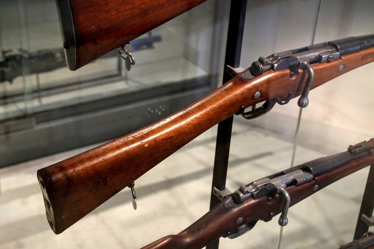 Crosse d'une carabine de cavalerie Berthier Mle 1892 pour cuirassiers prise au Musée de l'Armée aux Invalides à Paris